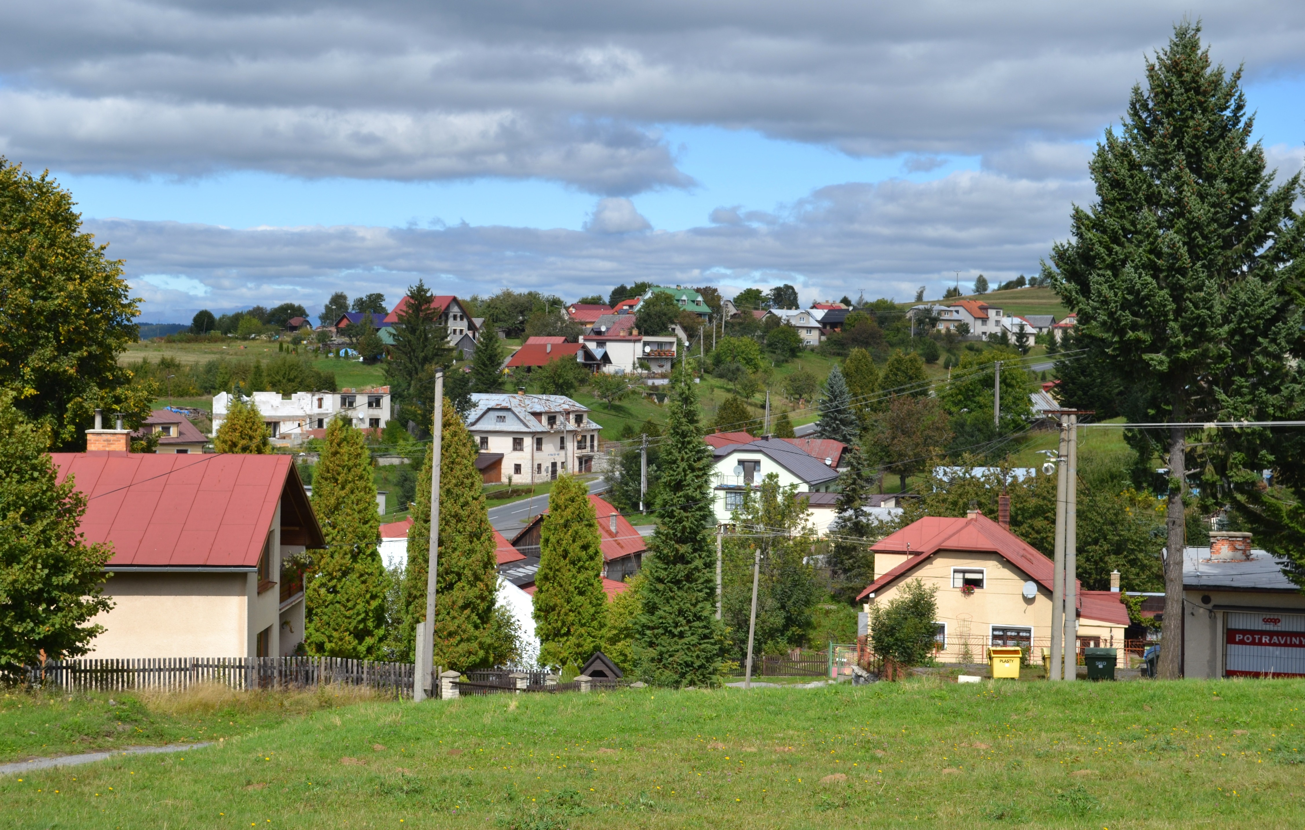 Pohľad na obec od kostola Nanebovzatia panny Márie